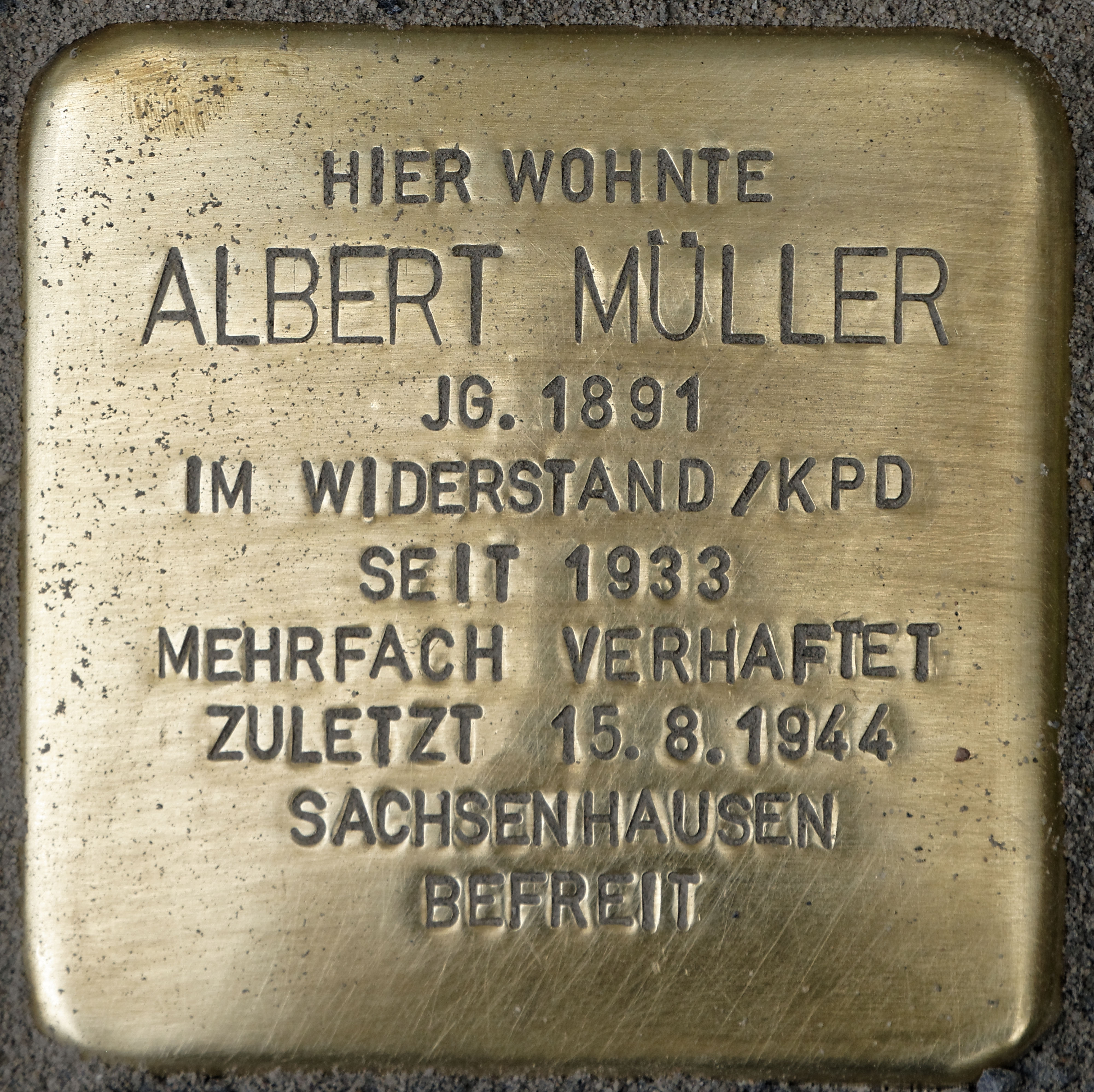 Stolperstein für Albert Müller, Potsdamer Straße 9, Solingen